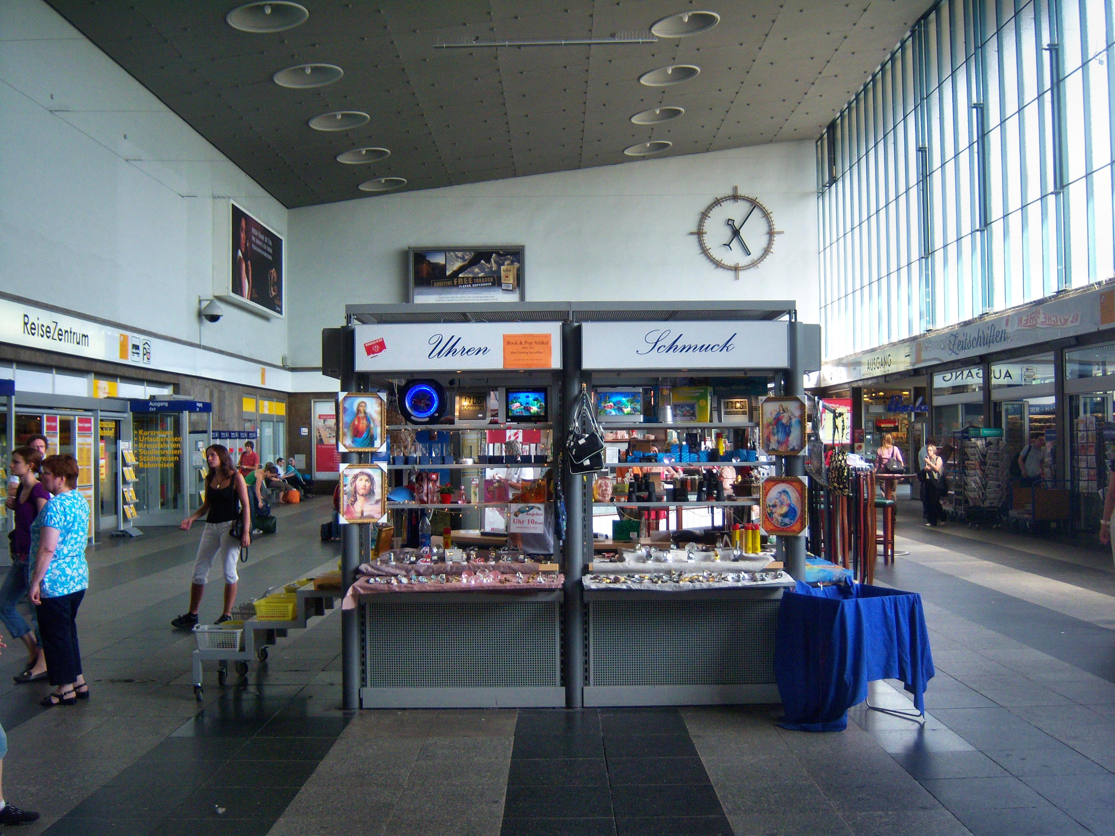 Empfangsgebäude des Würzburger Hauptbahnhofes